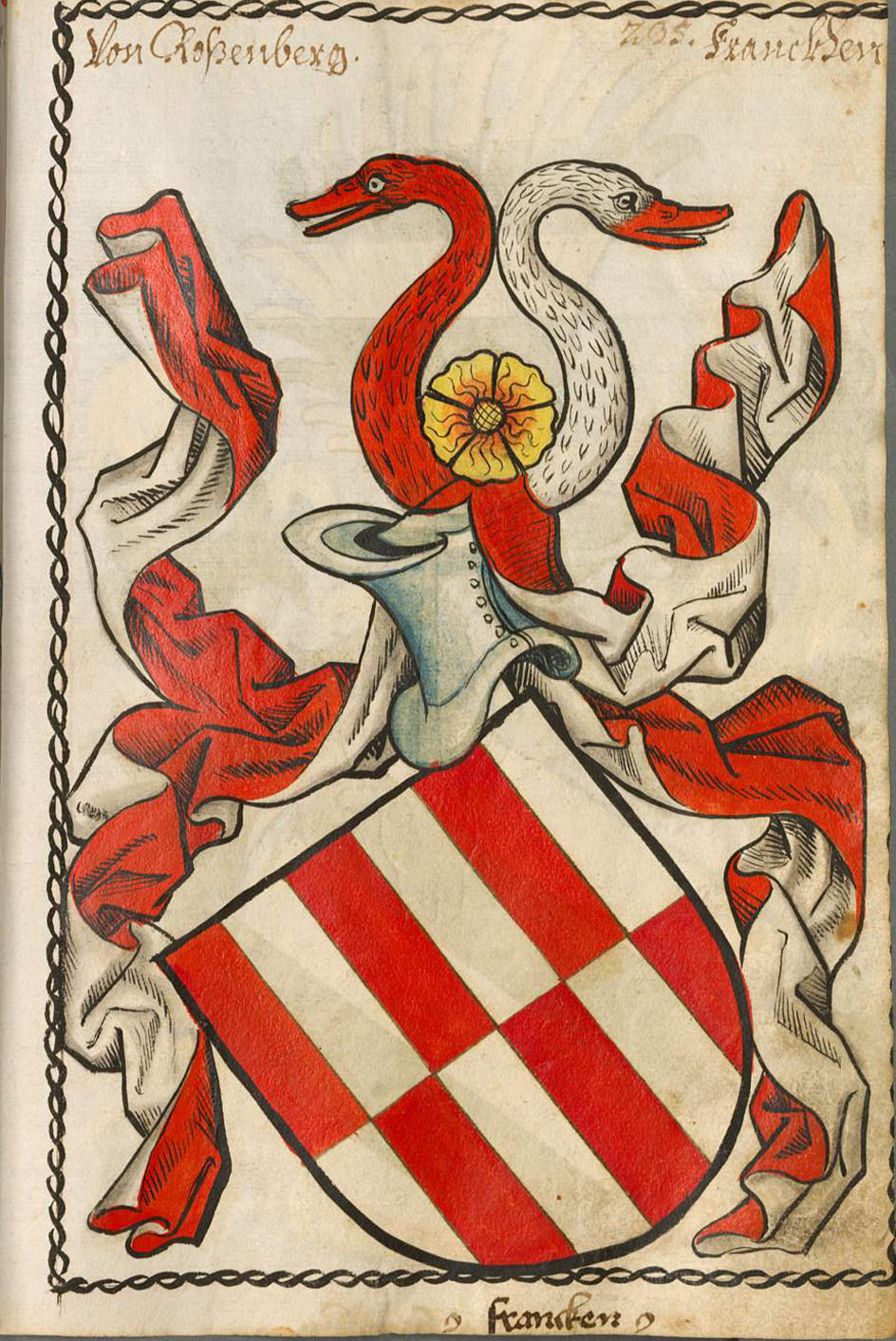 Scheibler'sches Wappenbuch , älterer Teil Rosenberg